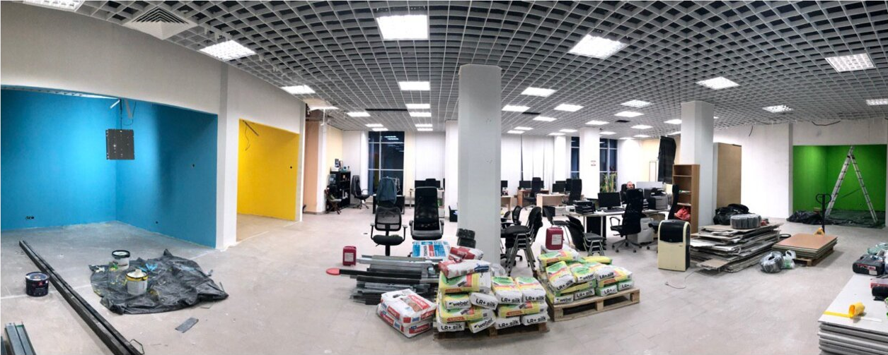 Новый офис компании PAL в Москве перед открытием. Ремонт на 2 этаже.